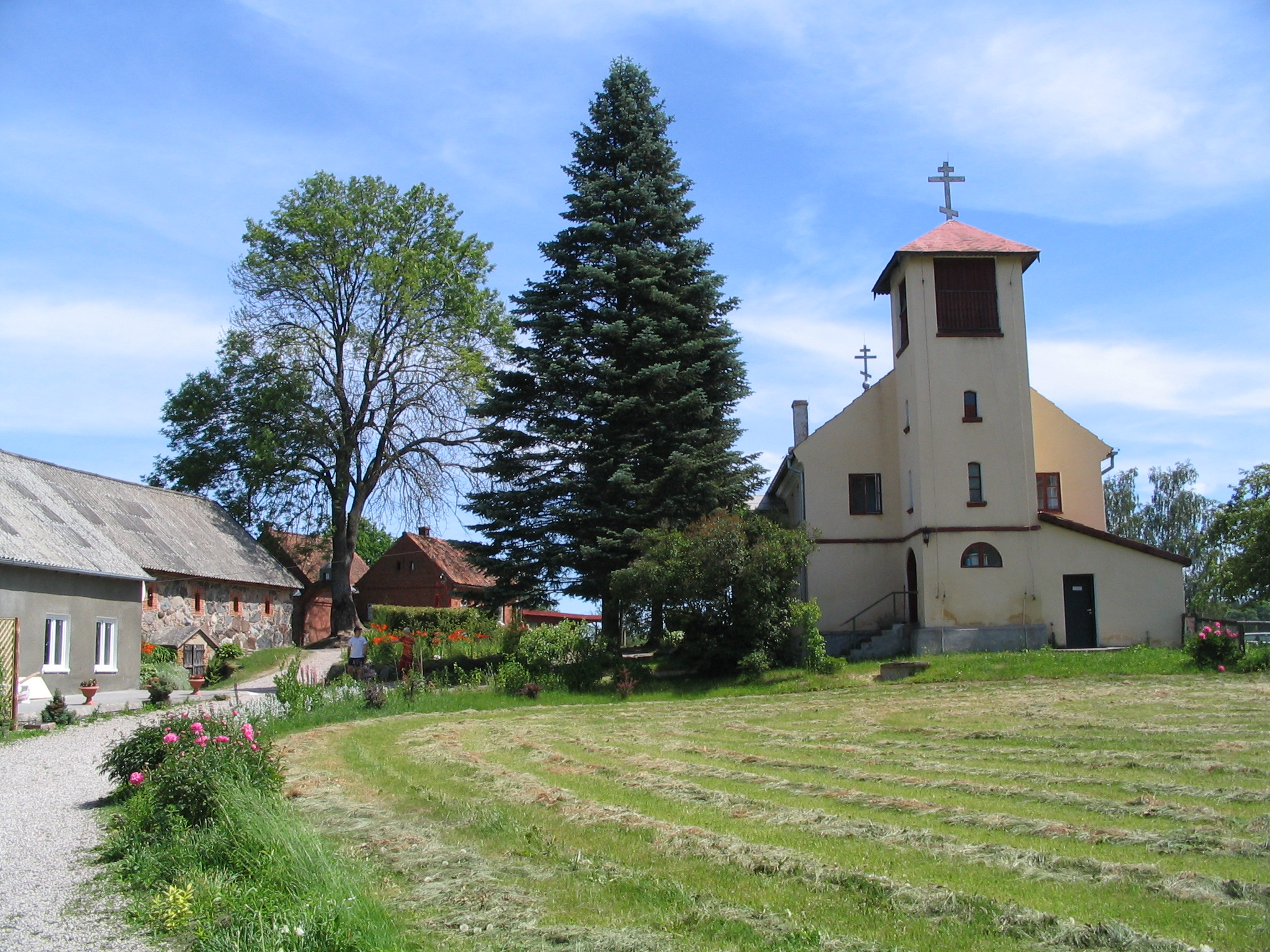 Monastyr staoobrzędowców w Wojnowie Author:Piotr Tysarczyk